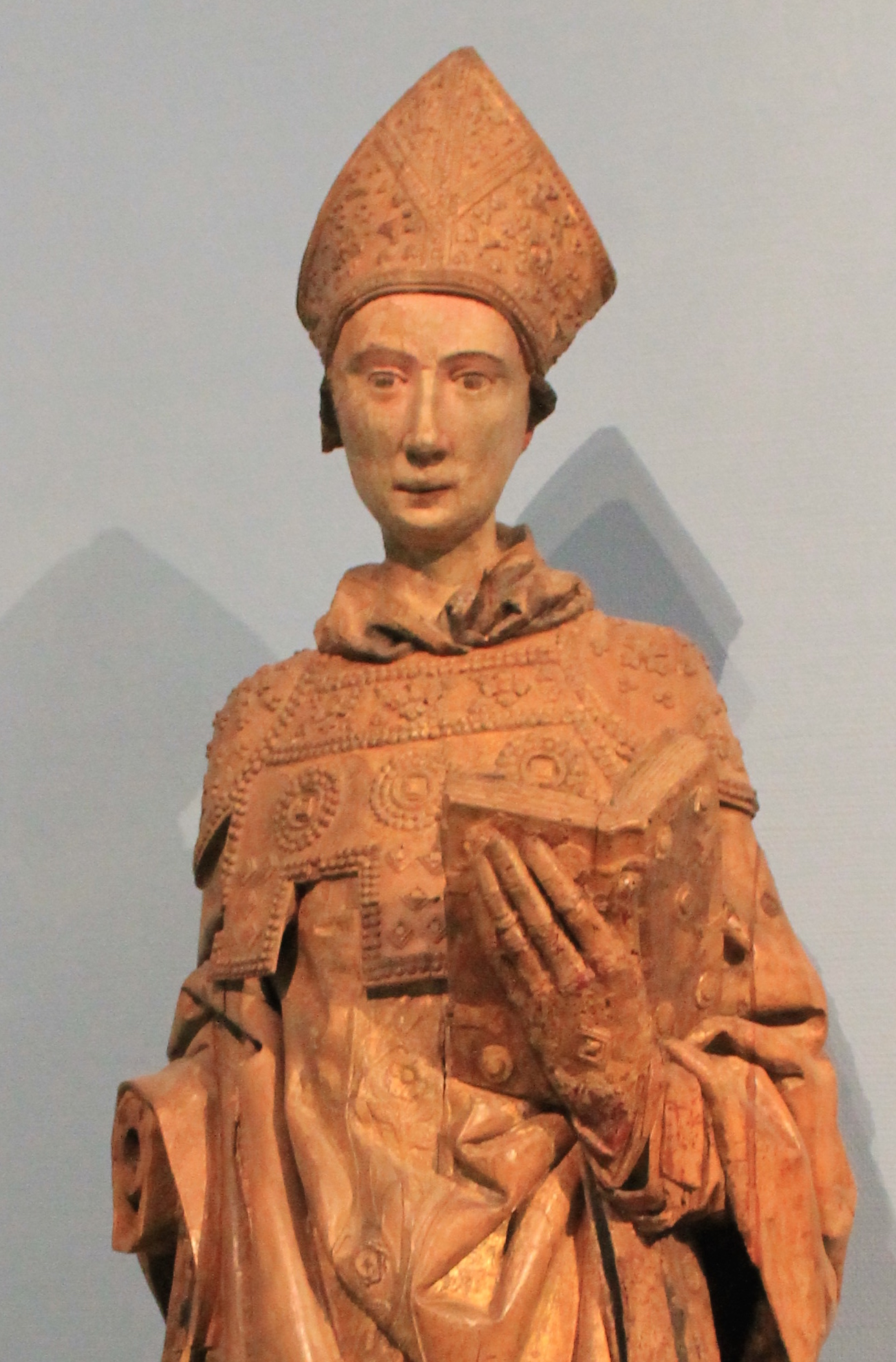 Sculpture d'un évêque de Liège portant la rationale, dite aussi surhumérale, XVIe siècle, conservée au Musée du Cinquantenaire, Bruxelles.